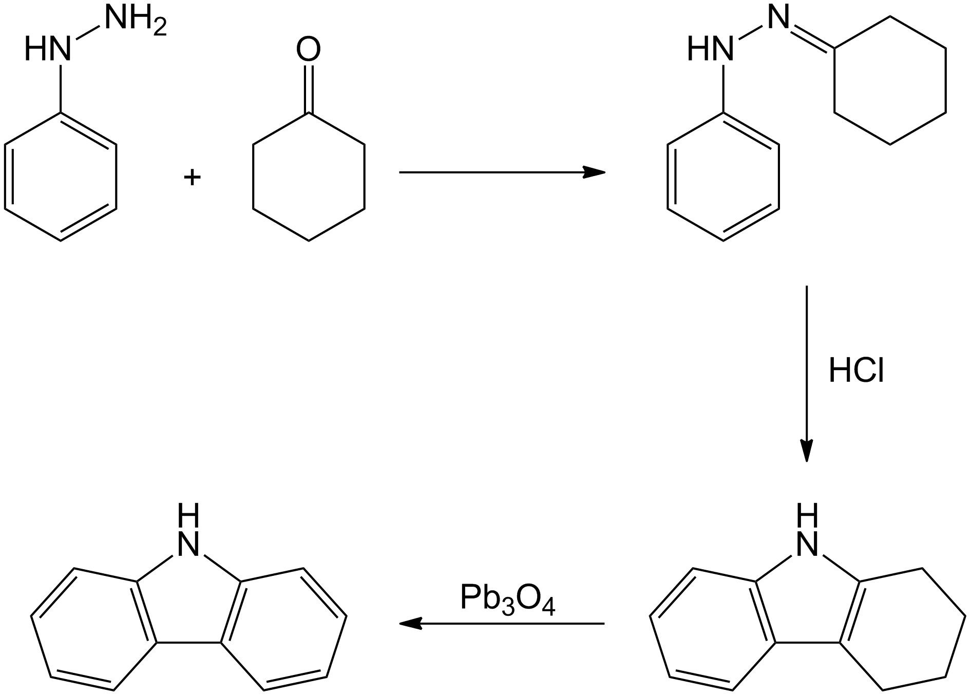 Borsche-Drechsel-cyclisatie